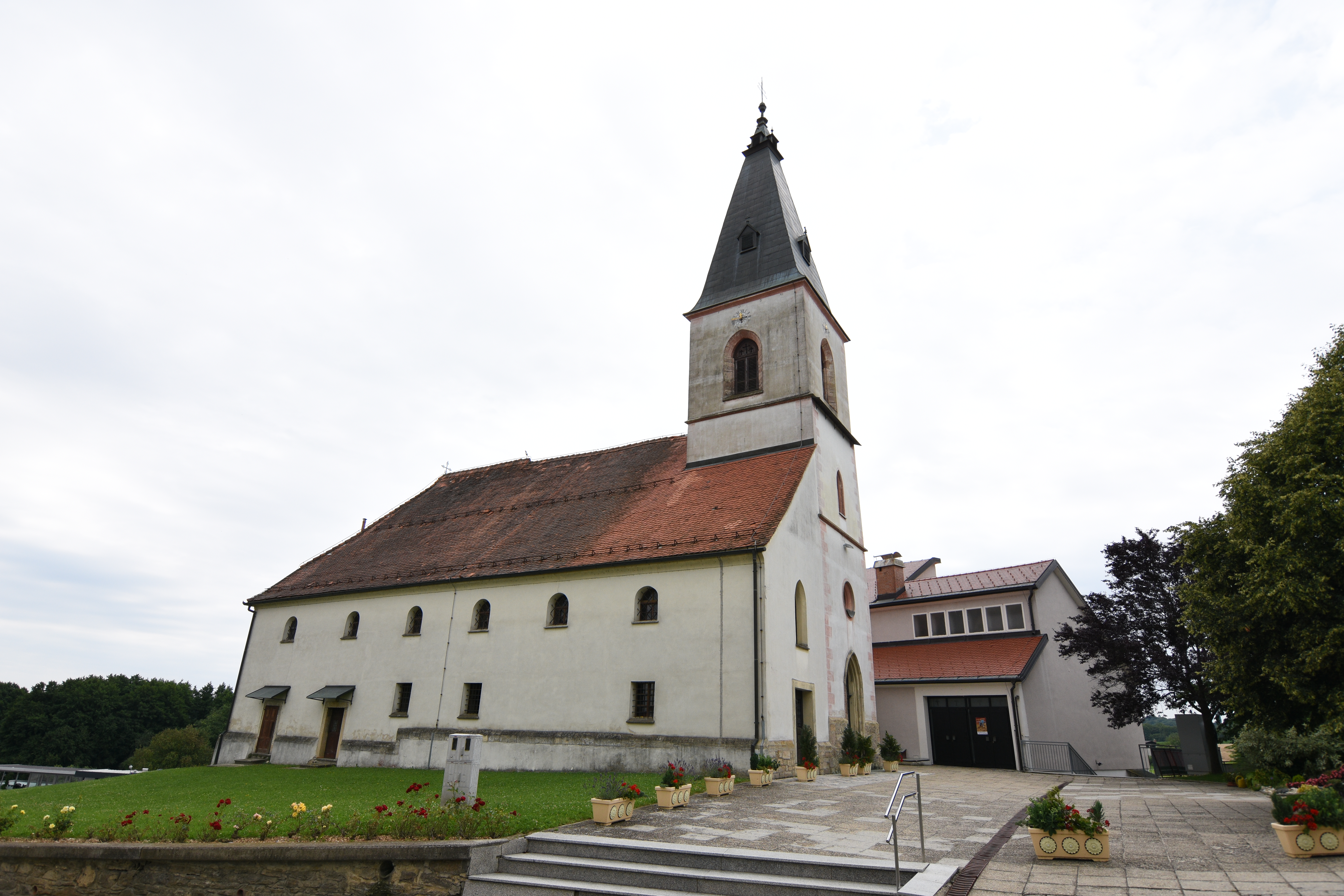 Župnijska cerkev sv. Jurija (Videm)